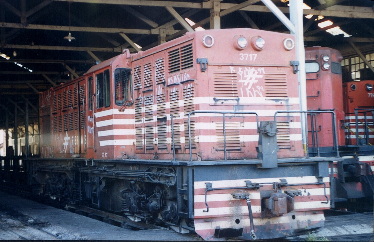 LEW DE II S FERROBAN #3717 - Triagem Paulista - Bauru-SP-Brasil. Locomotiva ainda ostentava a pintura da FEPASA